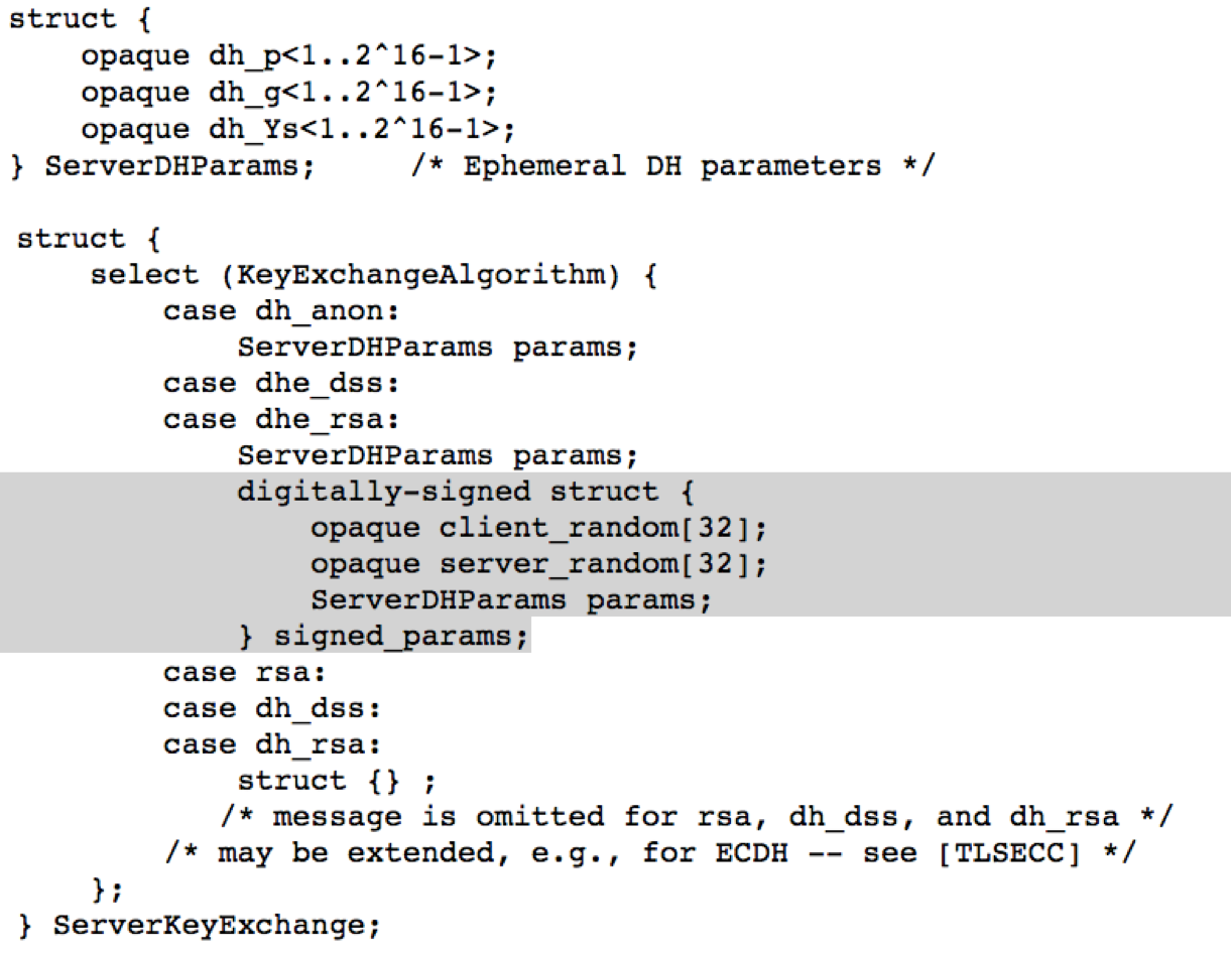 serverkeyexchange